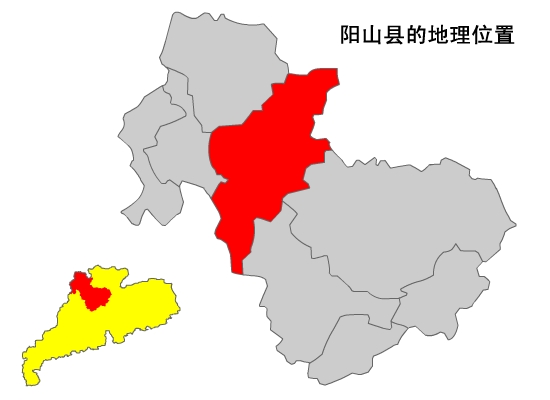 内容介绍：阳山县在清远地图上的标示 原创者：zhuwq 创作日期：2005年1月 创作方法：将广东地图用扫描仪输入电脑，再将图片导入FLASH，用画笔描出轮廓，着填充，删除原图片，导出JPG图象便大工告成，这样制作的优点是，开始辛苦了点，但绘制别的市便替换颜色即可。